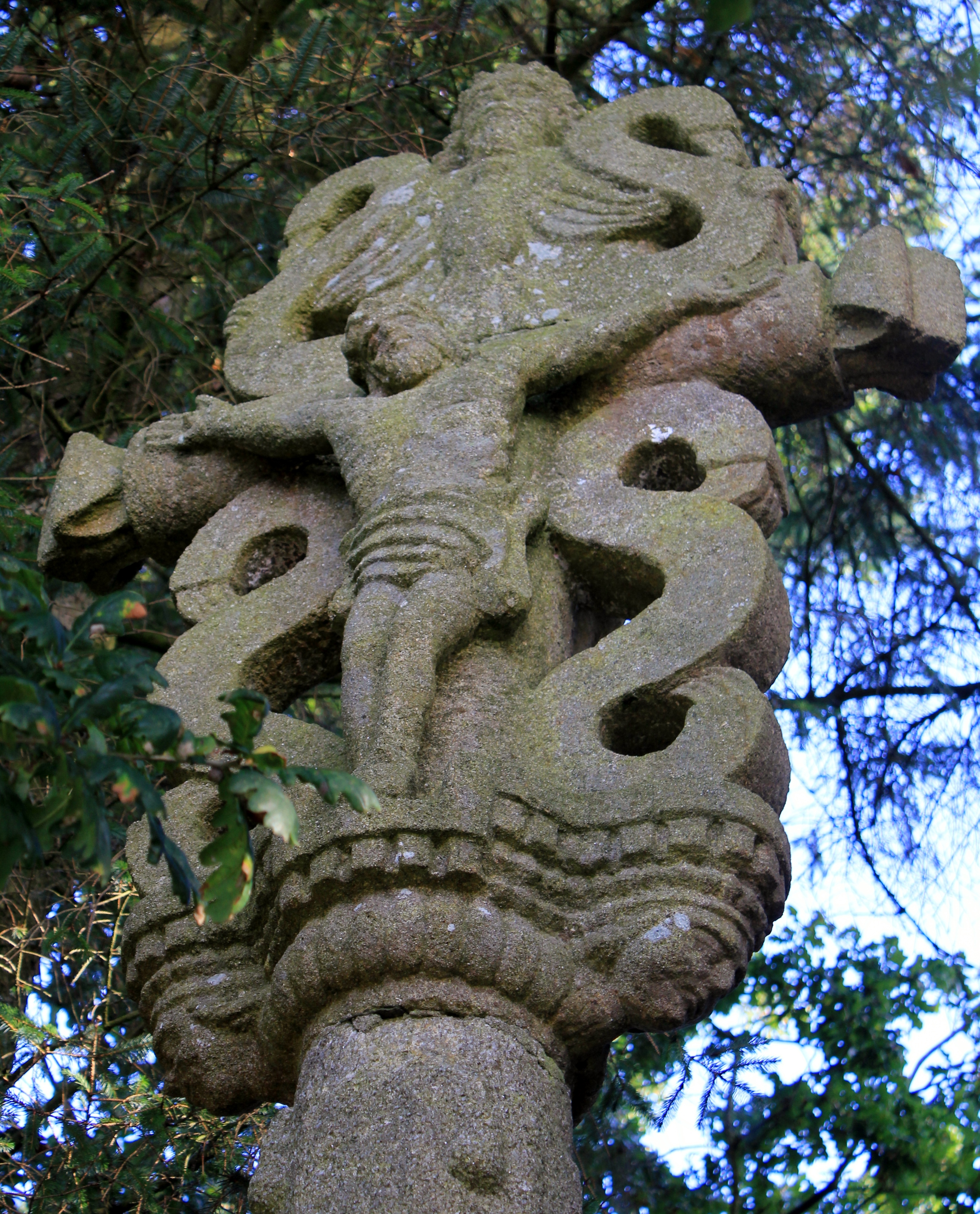 Croix de Kercloarec : détail Christ en croix